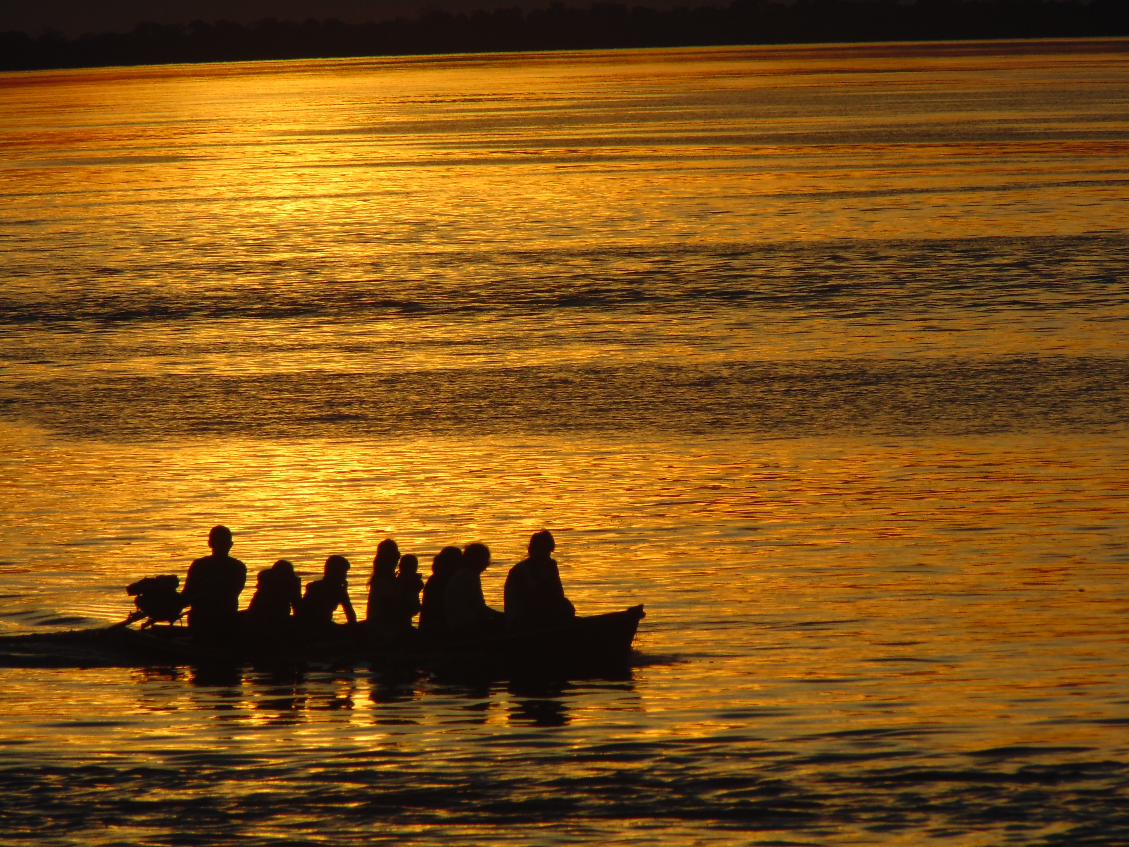 Foto tirada em São Paulo de Olivença